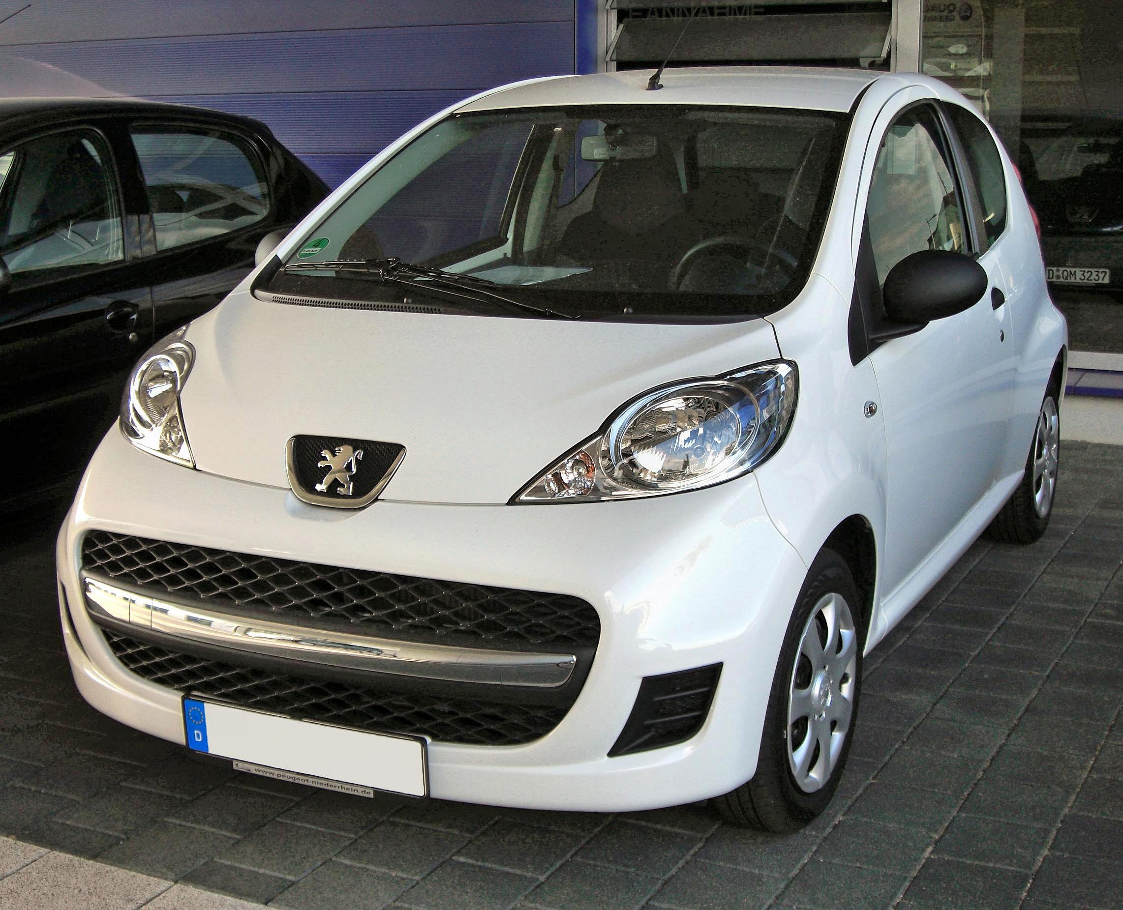 Peugeot 107 Facelift